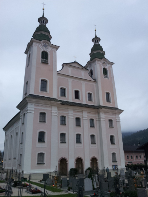 Dekanatspfarrkirche von Brixen im Thale